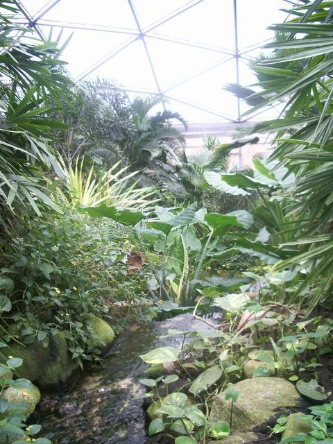 Papiliorama in Kerzers Switzerland Autor: Pjetter, 13.02.2005